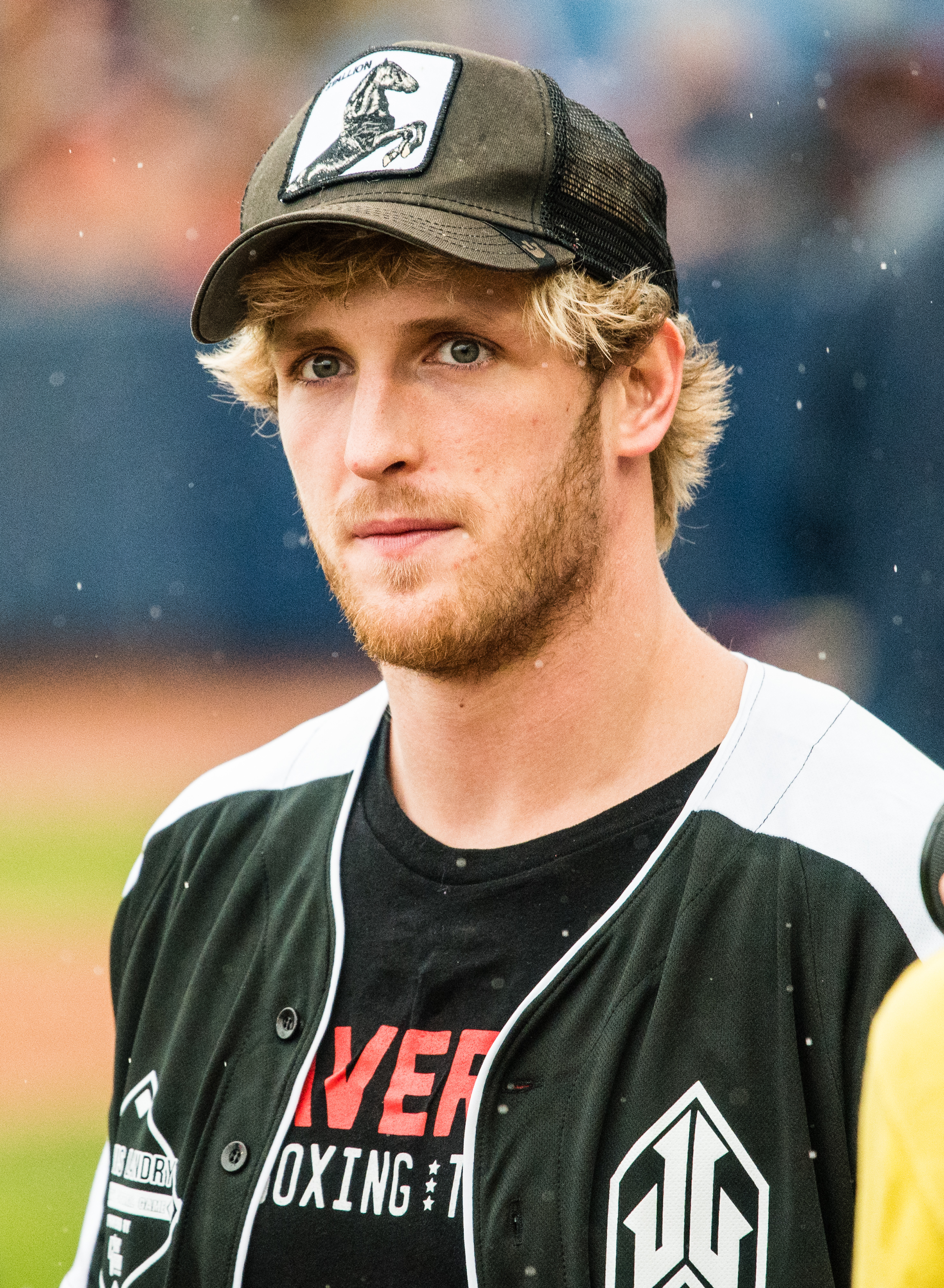 Logan Alexander Paul